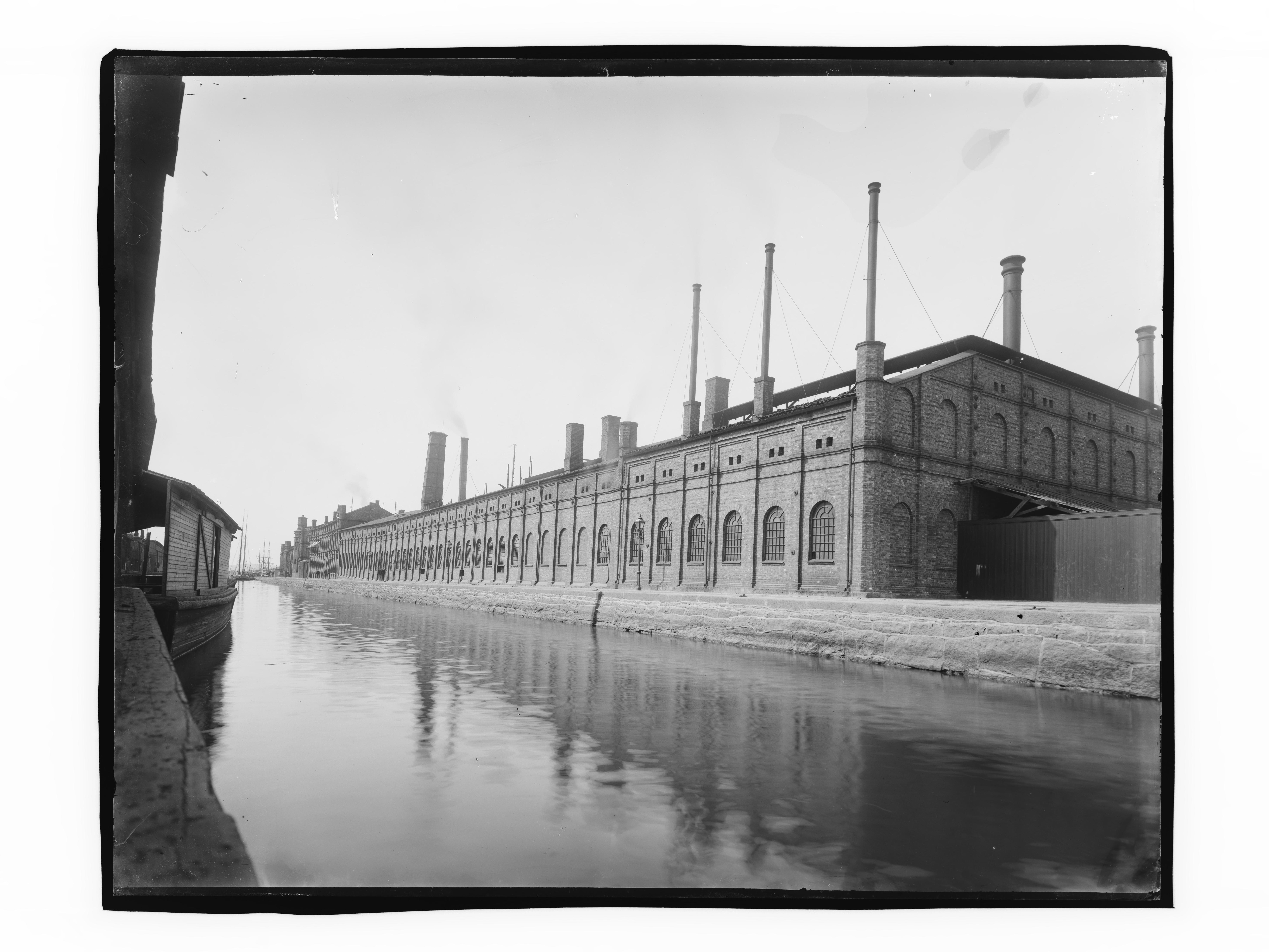 Påskrift konvolutt: B-1 Oslo. Nylandv. Nyland mek. verksted. Akerselven. [Riksantikvaren] Sted: Akerselva,Bjørvika Kommune: Oslo Fylke: Oslo Tagger: Nylands mekaniske verksted skipsverft fabrikk